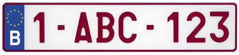 autokenteken België 1-BBQ-127